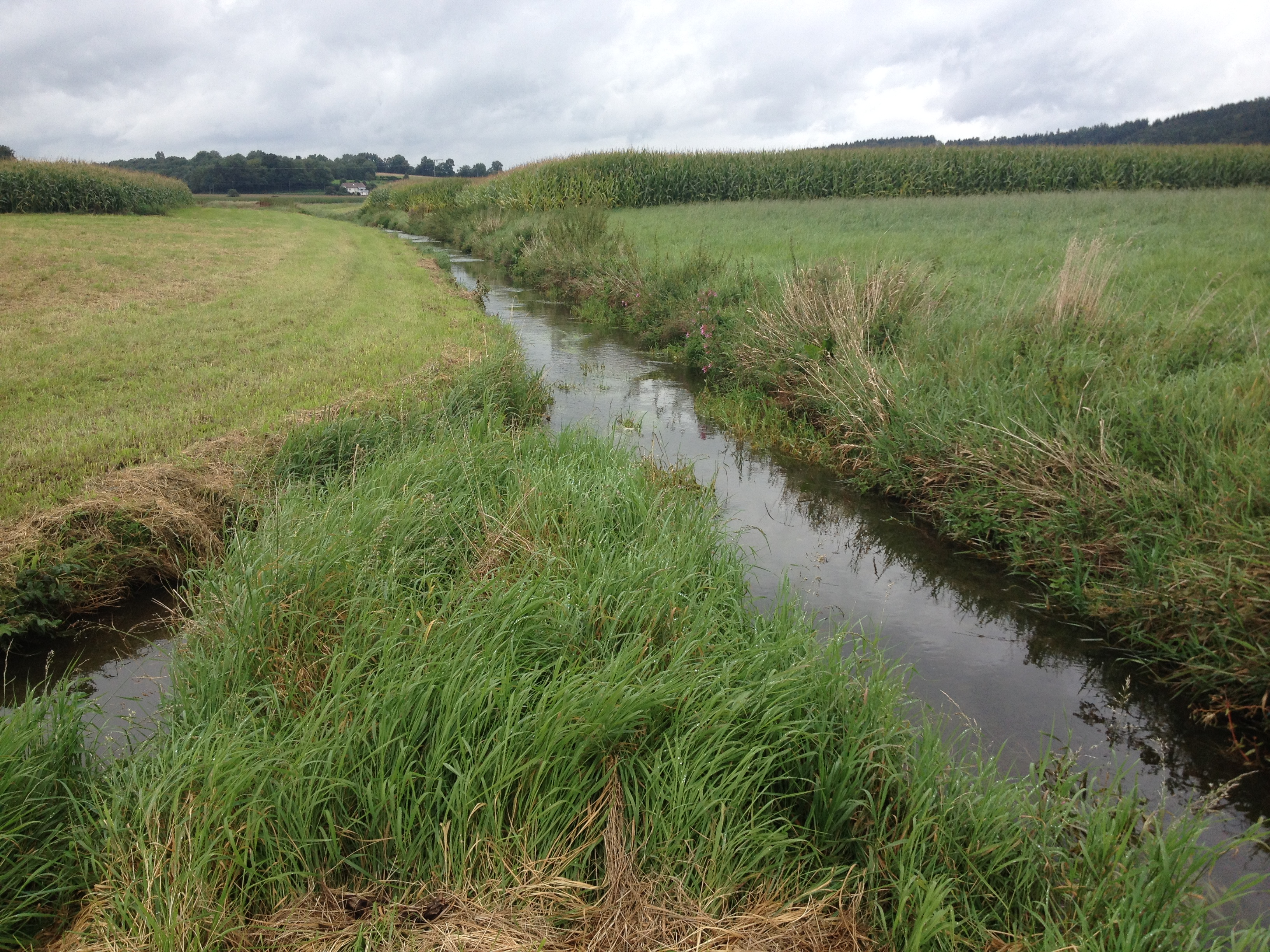 Mündung des Burraubachs (links) in den Kehlbach (Blick bachabwärts).